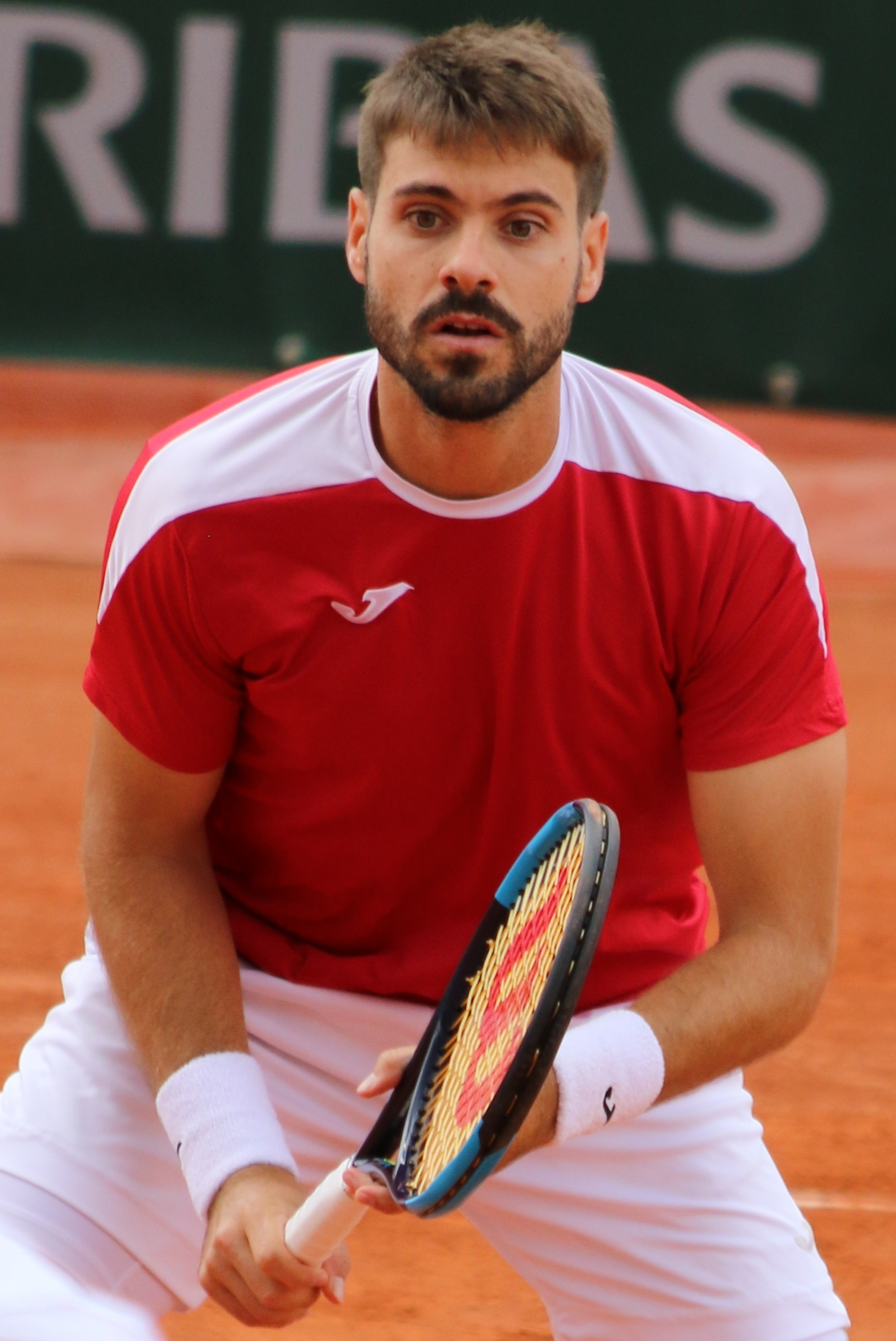 Granollers G. RG19 (13)